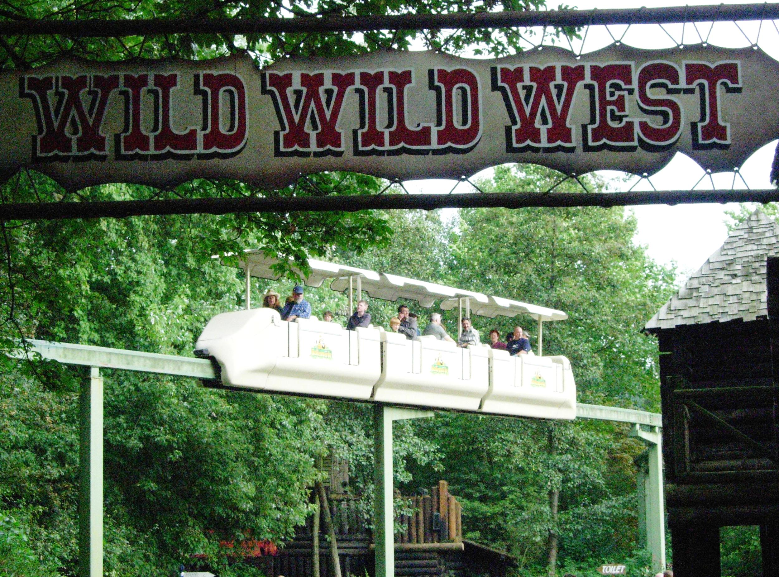 Monorail Bellewaerde